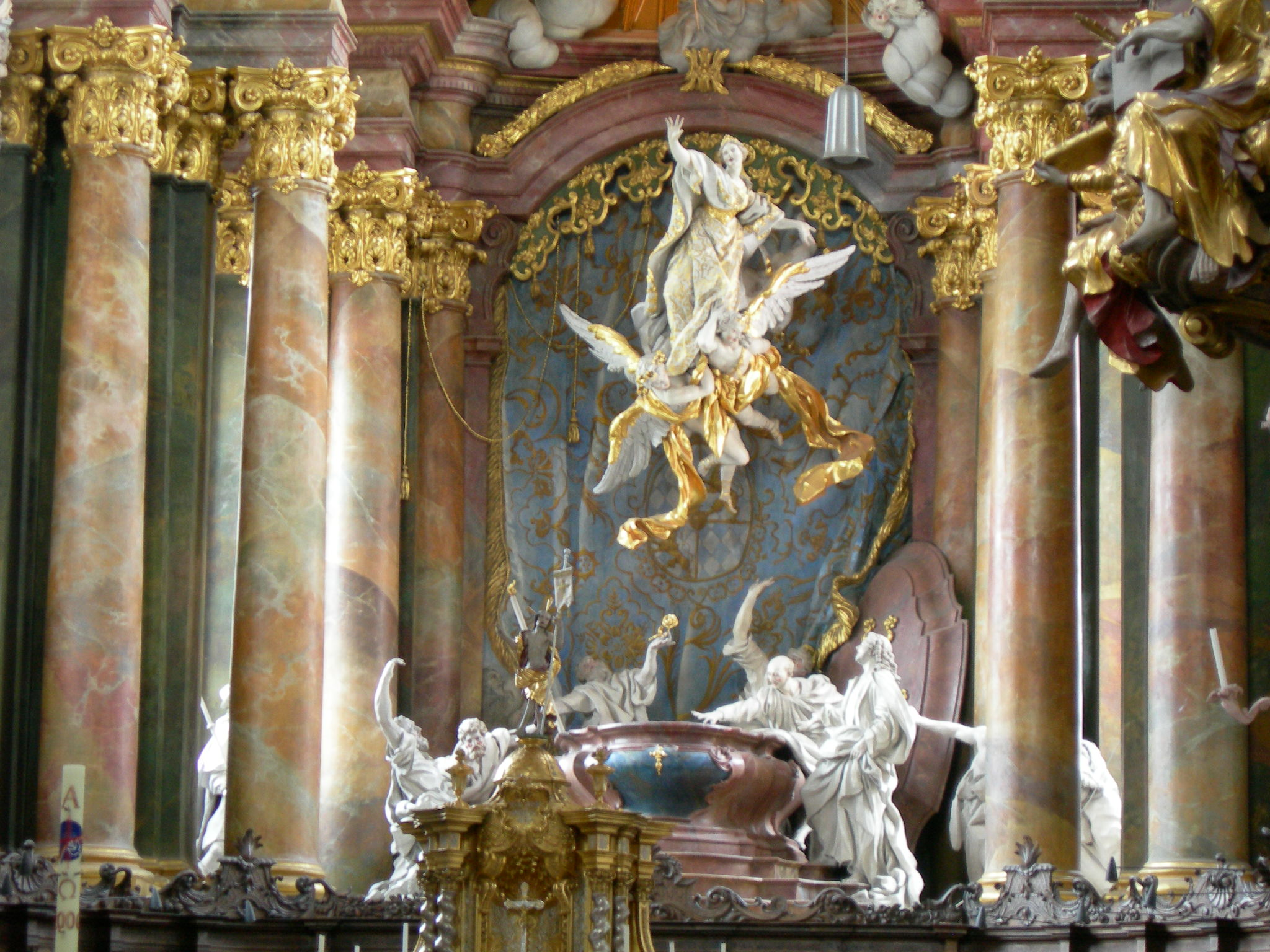 Kloster Rohr in Niederbayern